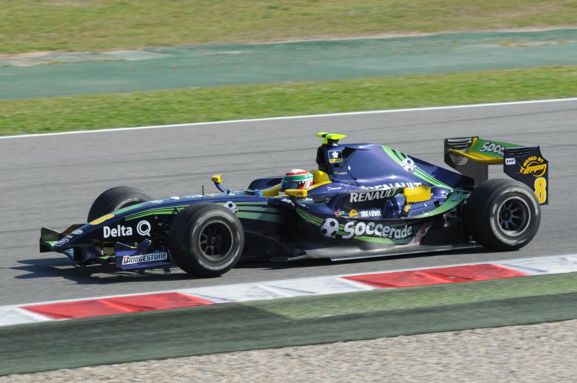 Alvaro Parente auf dem Weg zum Sieg in Lauf 1, Spanien 2008